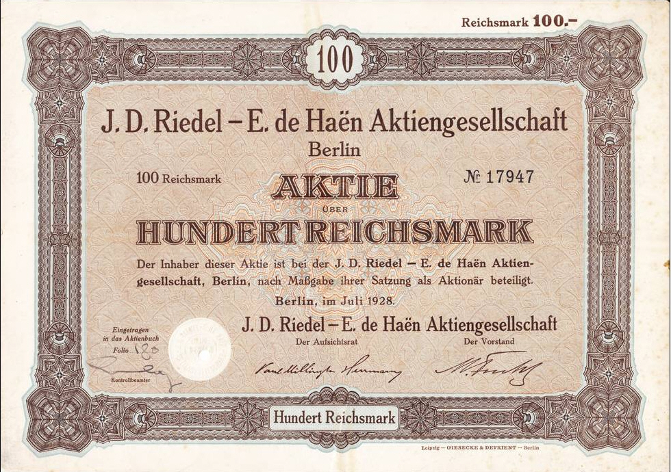 Aktie der J. D. Riedel - E. de Haen Aktiengesellschaft, Nennwert 100 Mark